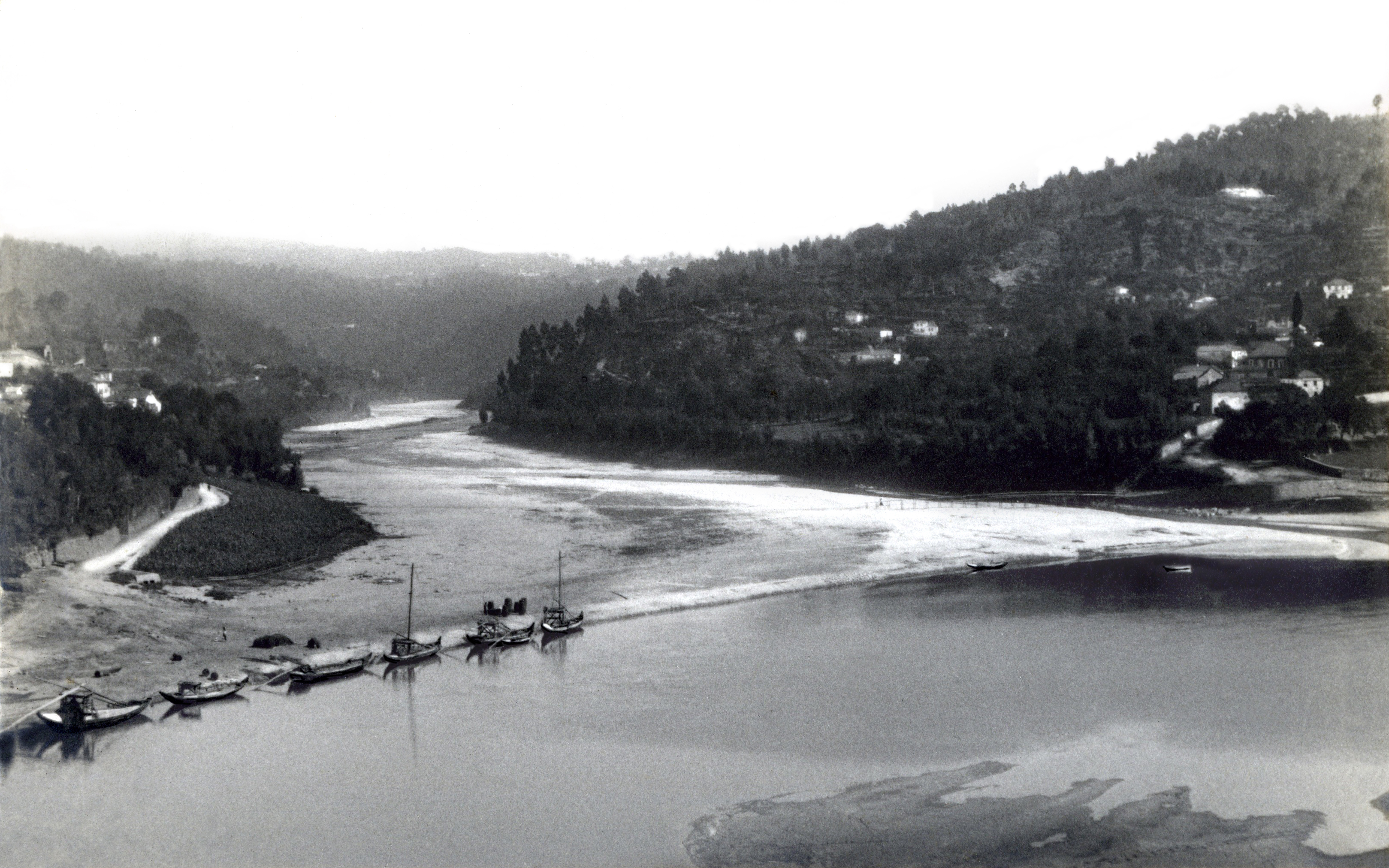 Confluência dos rios Douro e Tâmega. À esquerda, a povoação de Entre-os-Rios, Eja, em frente de Santa Clara do Torrão, freguesia de Marco de Canaveses.